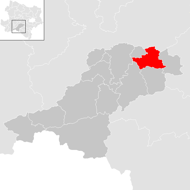 Bezirk Lilienfeld